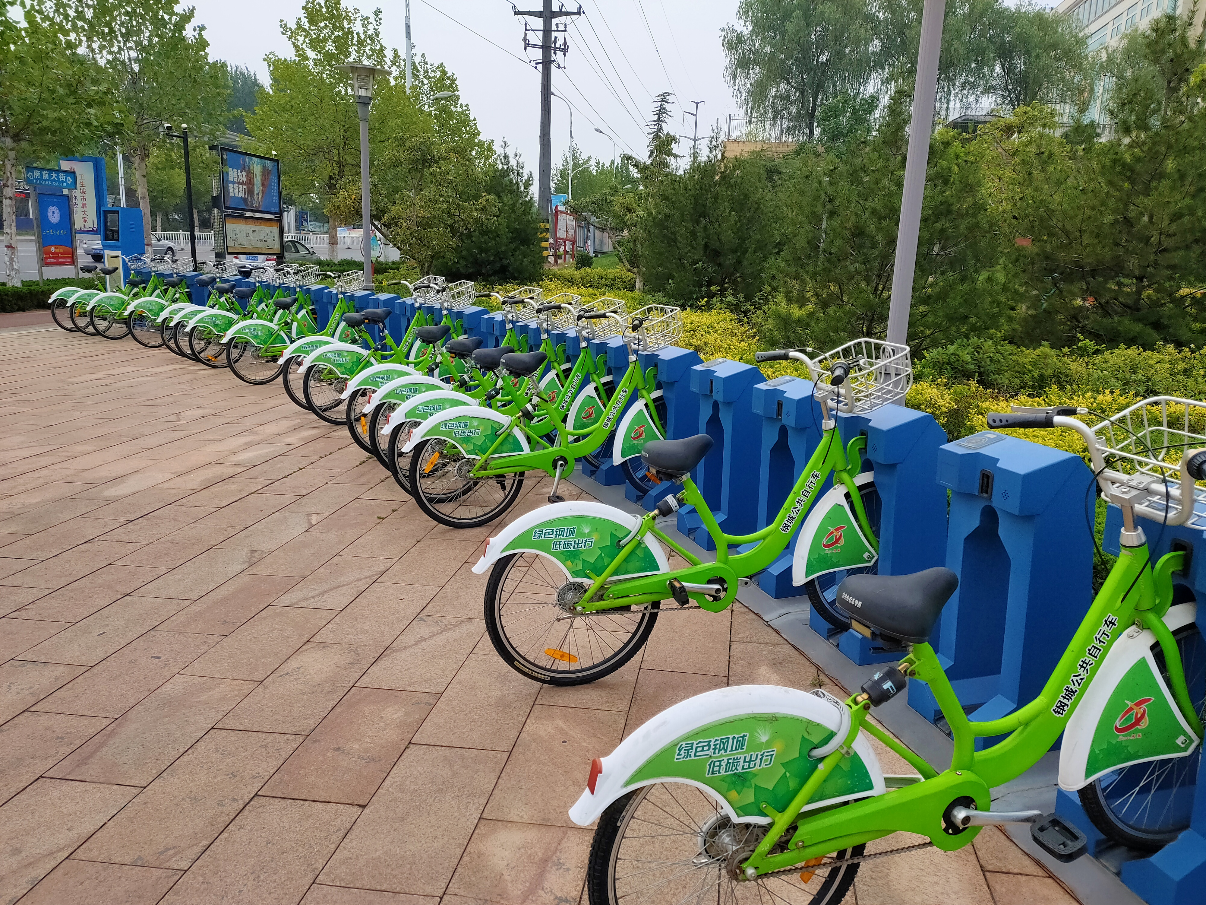 钢城区公共自行车